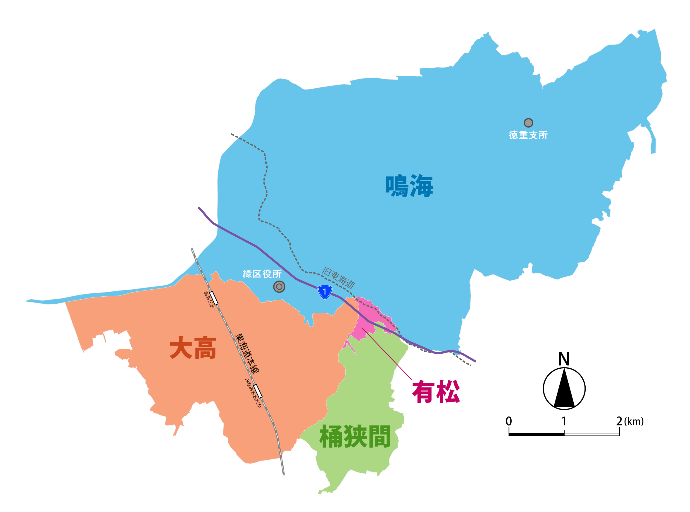 名古屋市緑区における旧町村配置図